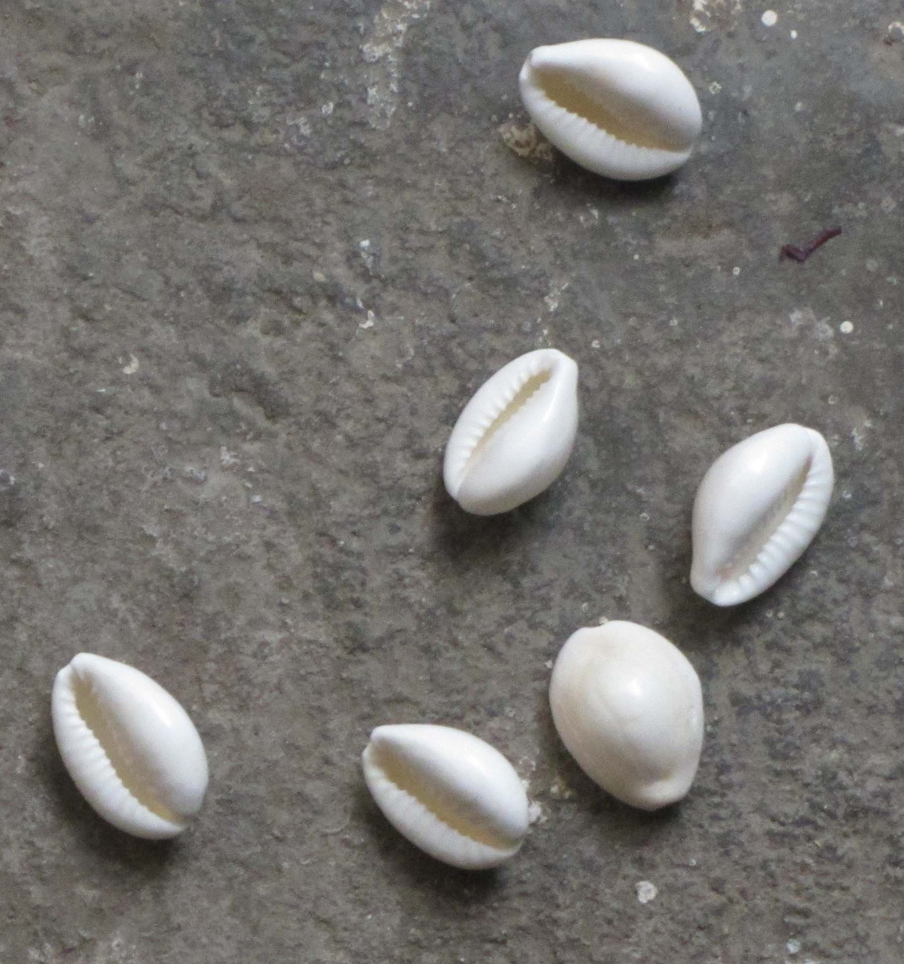 own shot - சோழி - இது தாயம், பரமபதம் முதலான ஊழ்த்திற விளையாட்டுகளில் உருட்டுகாயாகப் பயன்படுத்தப்படுகிறது.